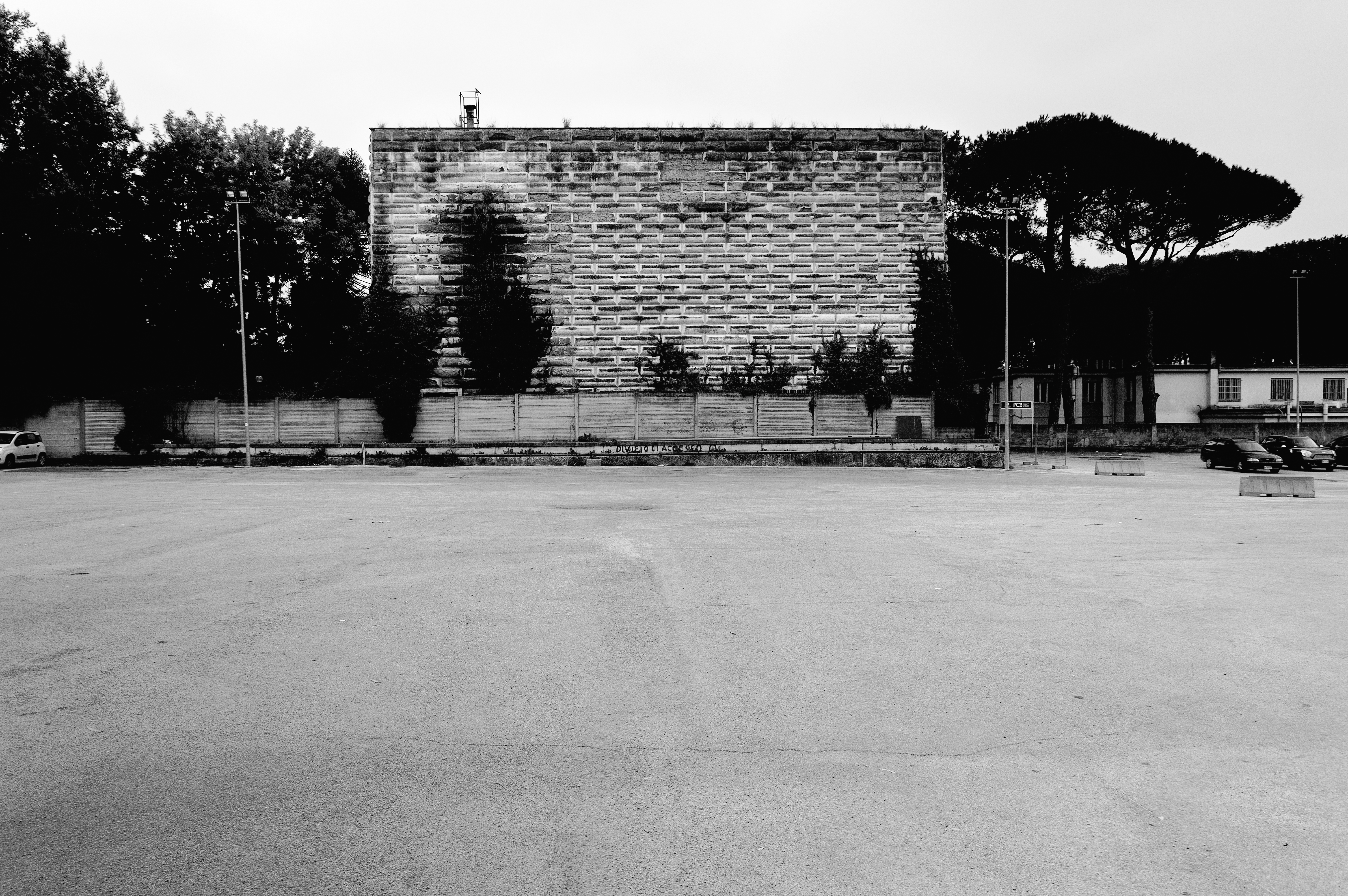 Prospetto laterale con il paramento in bugnato.